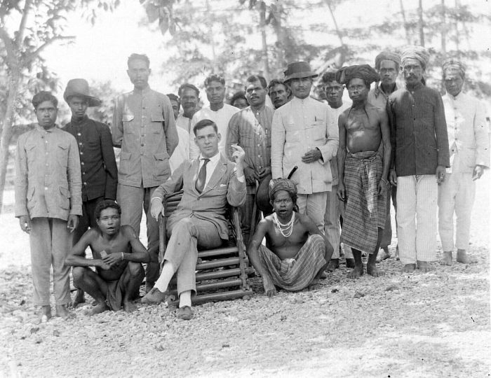 Repronegatief. Bestuursambtenaar van Seram tijdens een reis bij de Talsetibaai